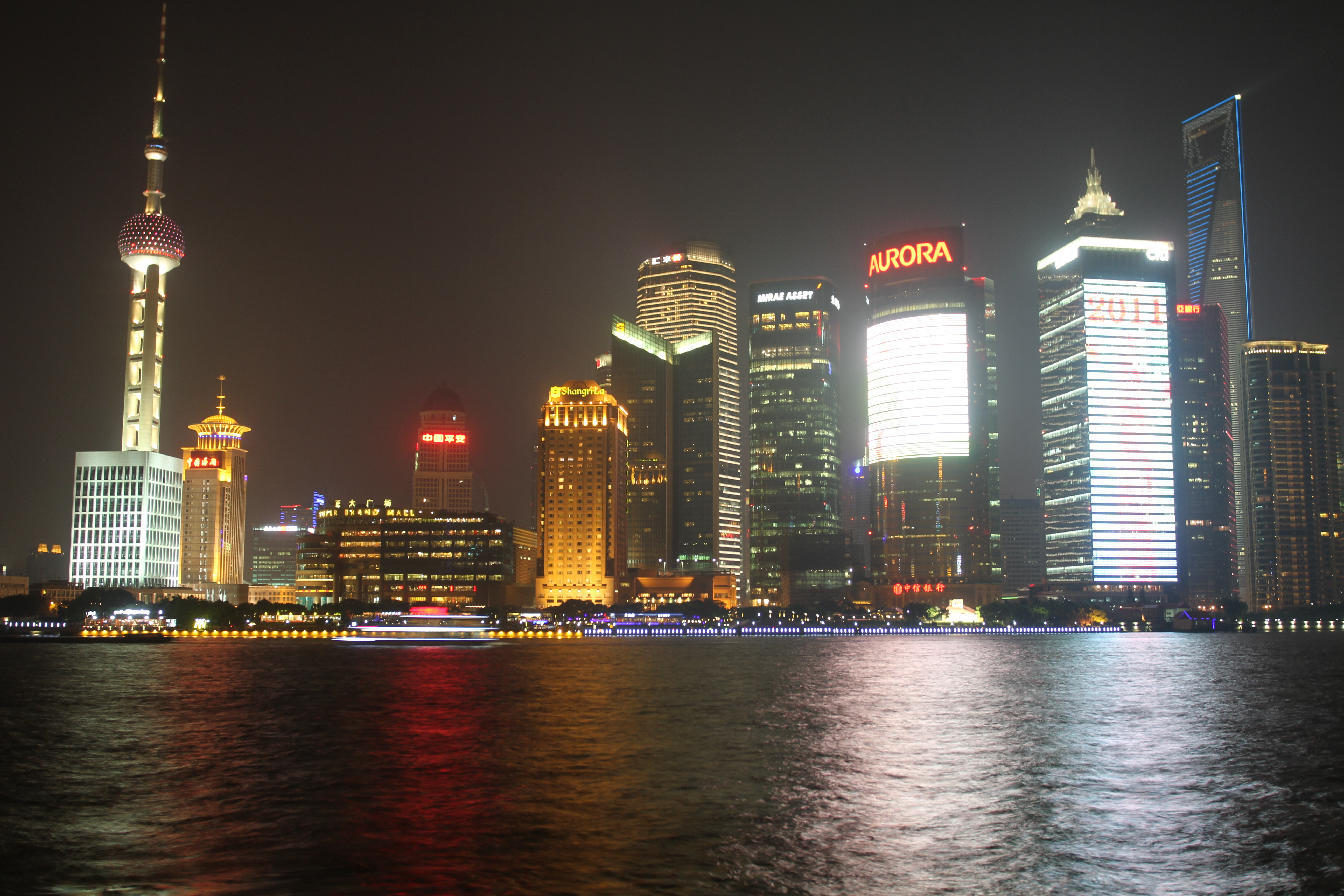 浦东新区在2011年